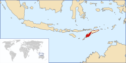 MAPA REGIONAL DE Timor Occidental